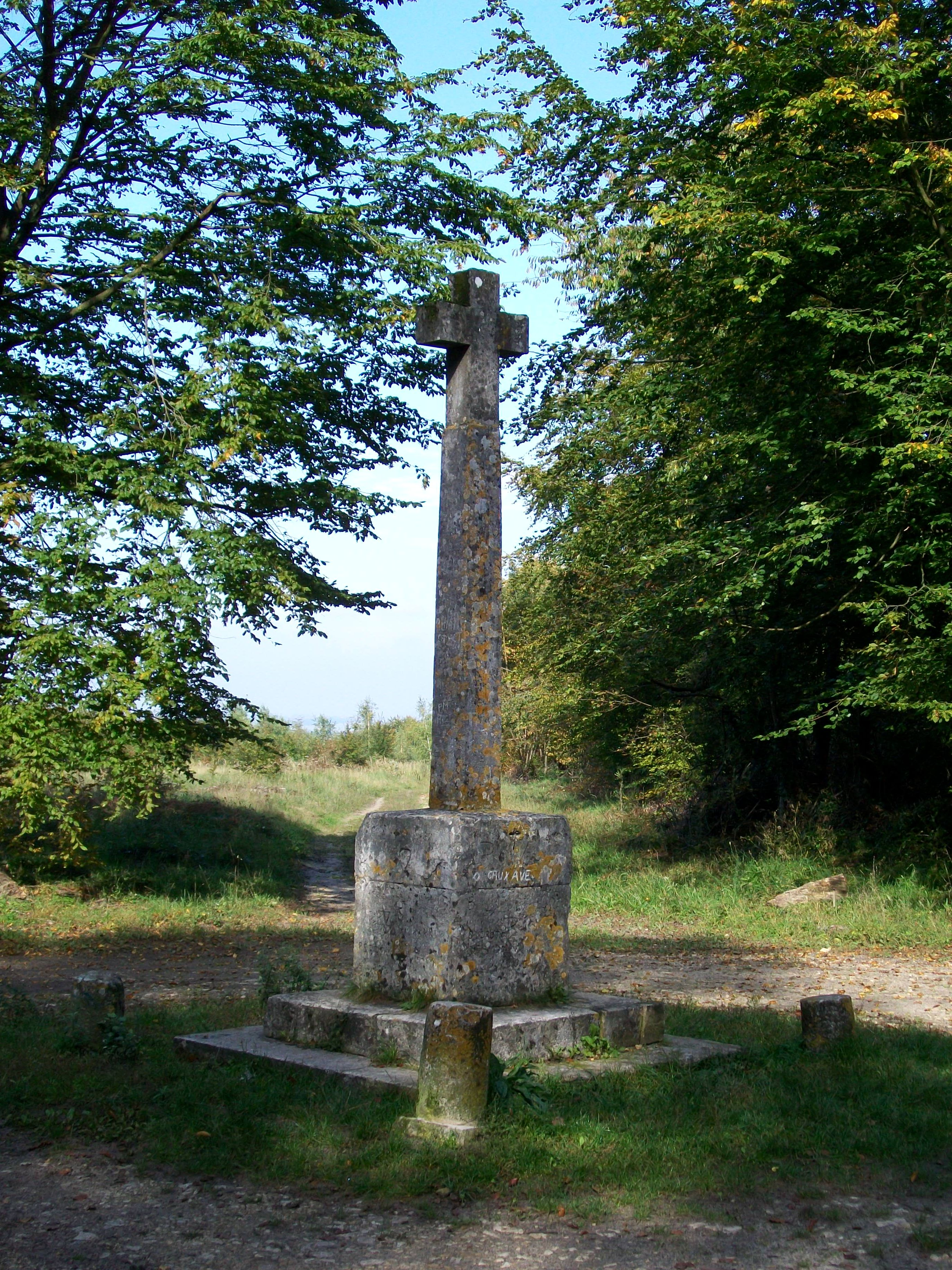 Le carrefour des Veneurs dans le secteur nord-ouest de la forêt d'Halatte, près de Beaurepaire.